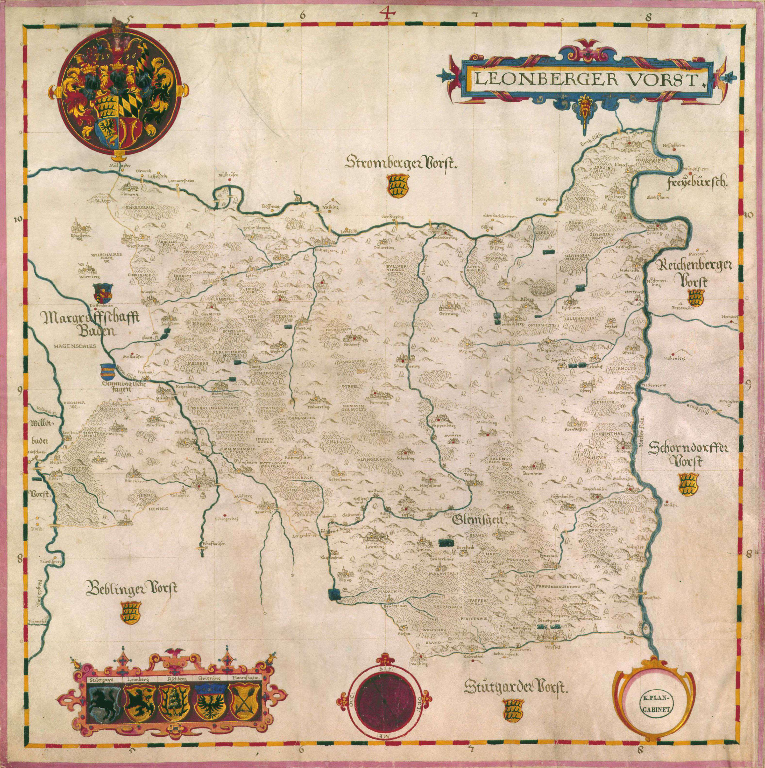 Gadnersche Forstkarte 4 vom Leonberger Forst (1589/90) mit Wappen von Stuttgart, Leonberg, Asperg, Grüningen und Heimsheim. Geographische Begrenzung: Enz von Dürrmenz bis Besigheim (N), Neckar von Besigheim bis (Stuttgart-)Berg (O), Nesenbach von Berg bis Vaihingen auf den Fildern (S), Renningen, Weil der Stadt, Althengstett (SW), Nagoldabschnitt mit St. Aurelius in Hirsau (W), Hausen an der Würm, Wiernsheim (NW), außerhalb des Forstes Öschelbronn und Wurmberg (NW)